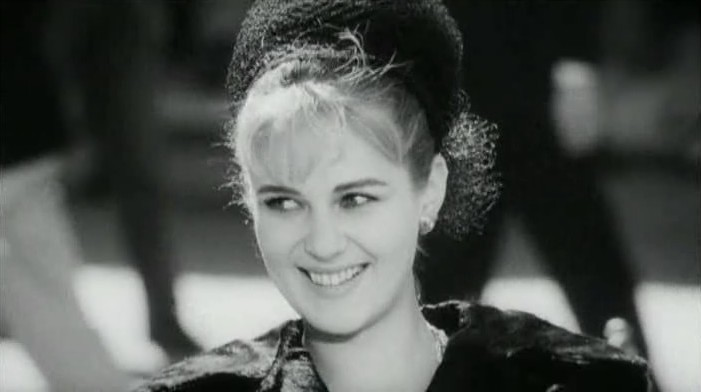 Beba Loncar interpreta Noemi Castellan nel film Signore & signori (1966) di Pietro Germi.